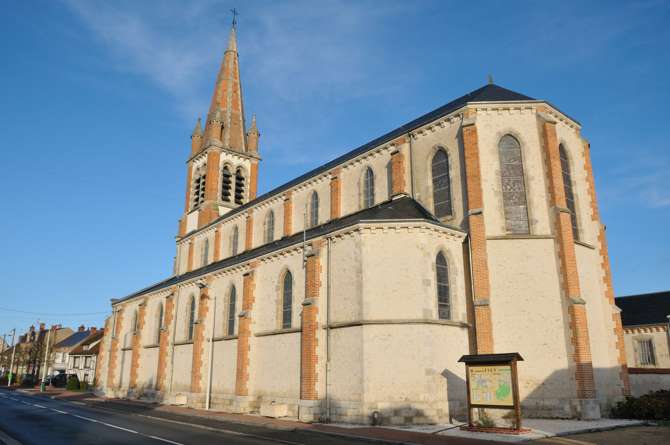 Église Saint-Martin, Tigy, Loiret, France